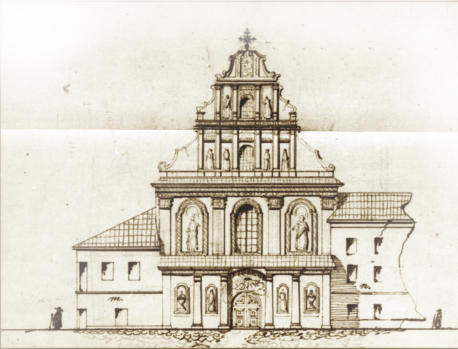 Беларуская (тарашкевіца): Менск (Miensk), рог Высокага Рынку (Vysoki Rynak) і вуліцы Дамініканскай (vulica Daminikanskaja). Царква Сьвятога Духа, абмеры